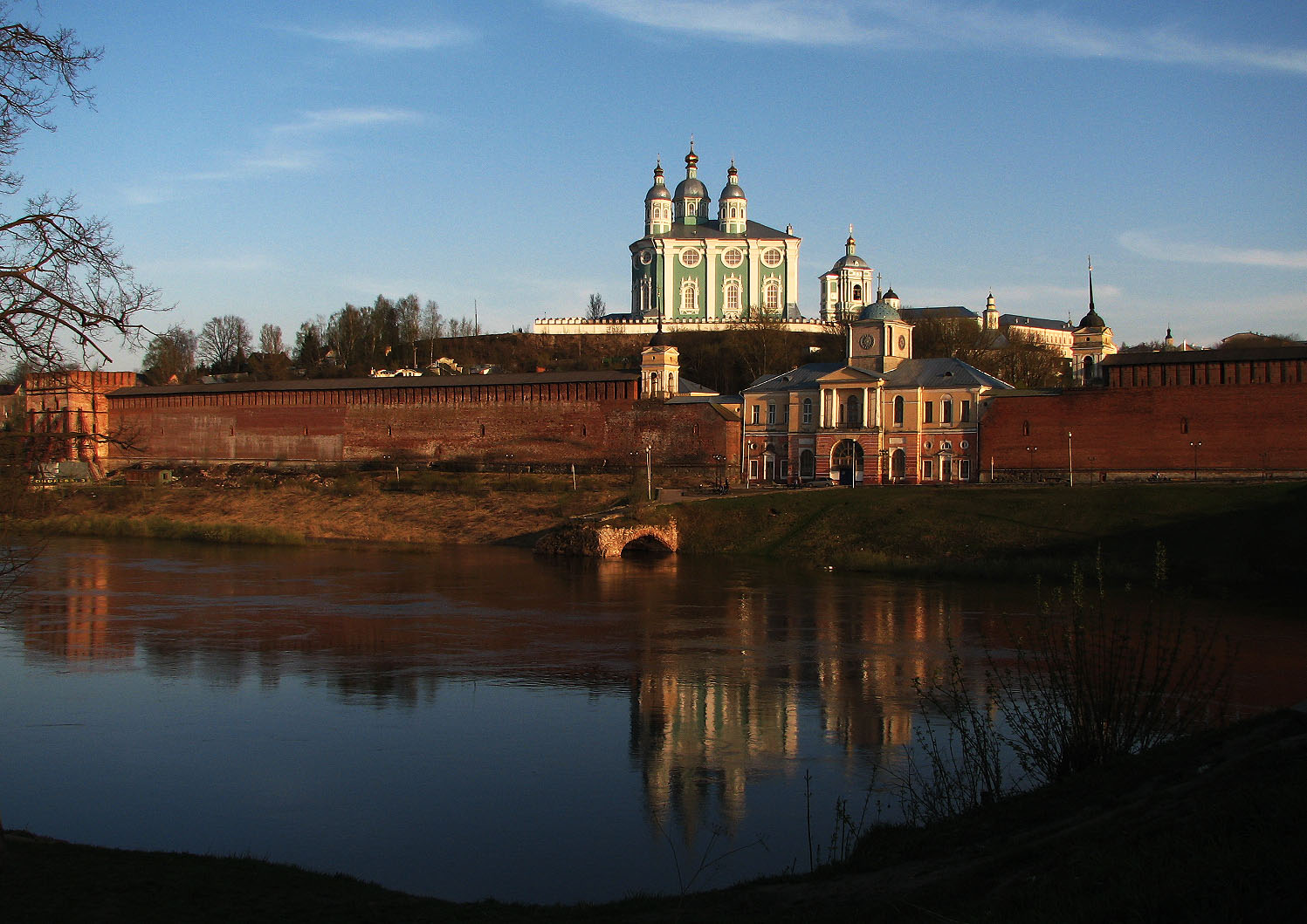 Собор Успенский (Смоленская область, Смоленск, Советский переулок, 13, Соборная гора, 5, 7, 11, 13, 15, 17, Большая Советская улица)